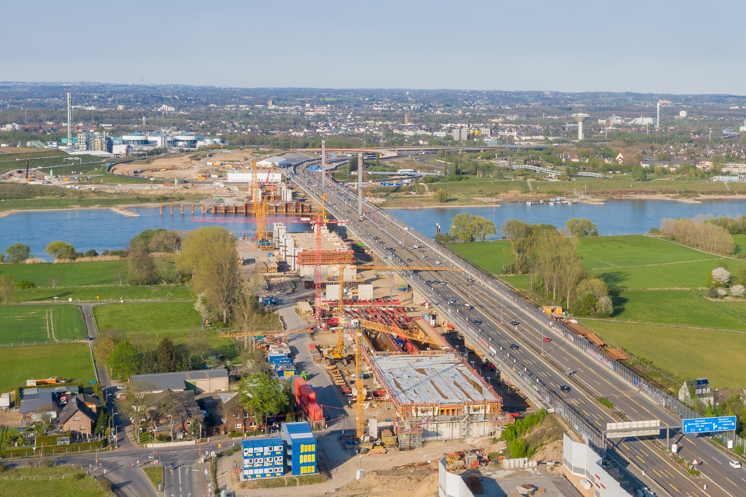 Neubau Leverkusener Rheinbrücke - Baustelle Luftaufnahme